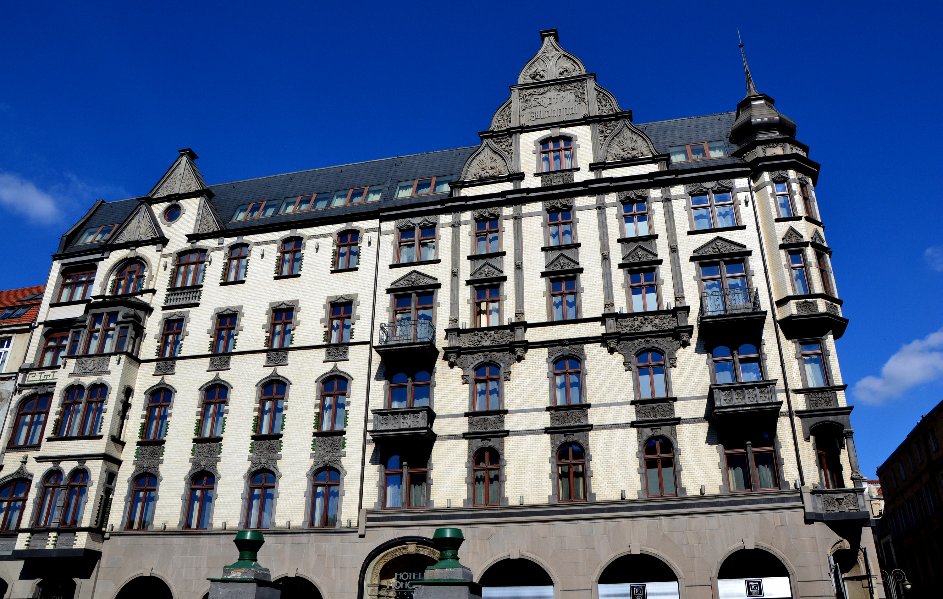 Zabudowania dawnego hotelu Monopol w Katowicach (zabytek nr A/1526/93)